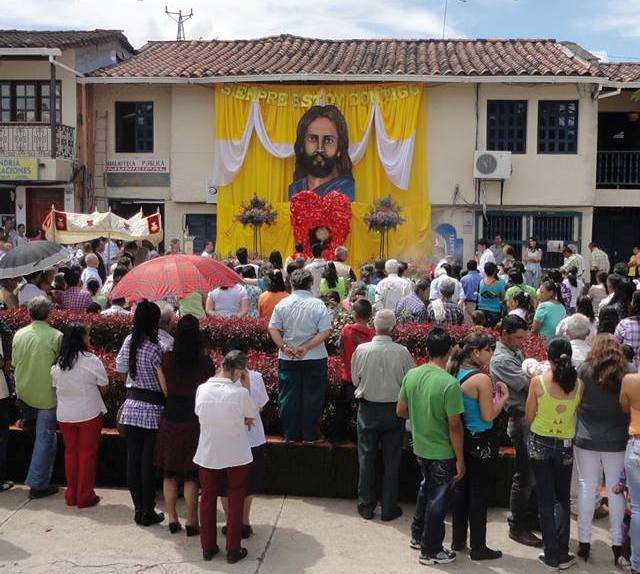 Altar de Cospus Cristi Alejandria